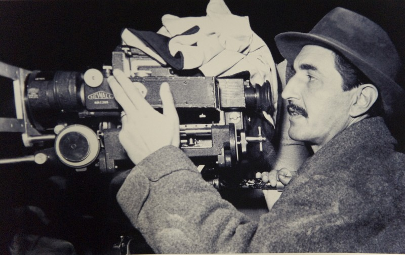 Antonio Leonviola, réalisateur italien